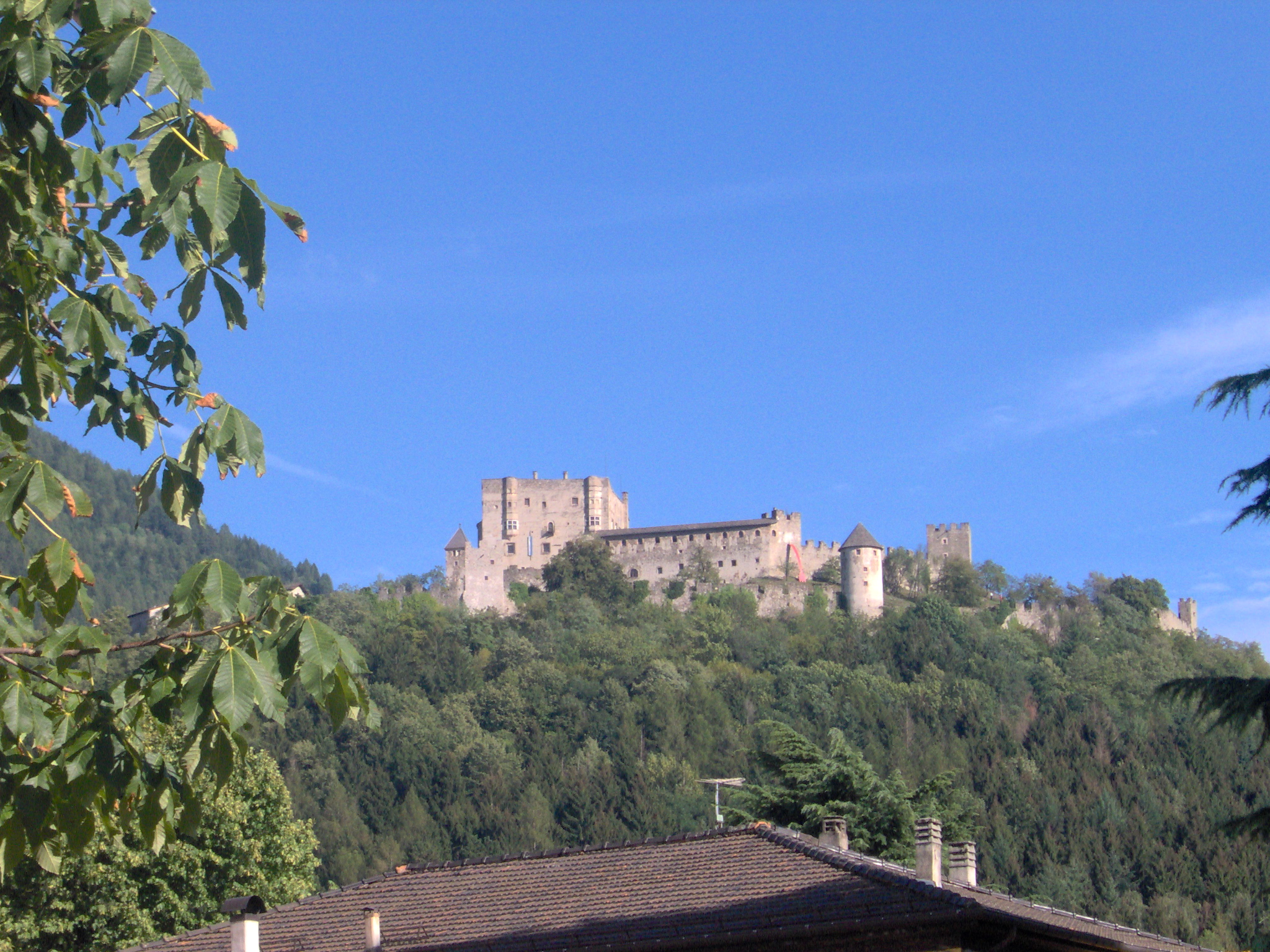 Image Palio dell'Assunta (16/08/2006) - Siena